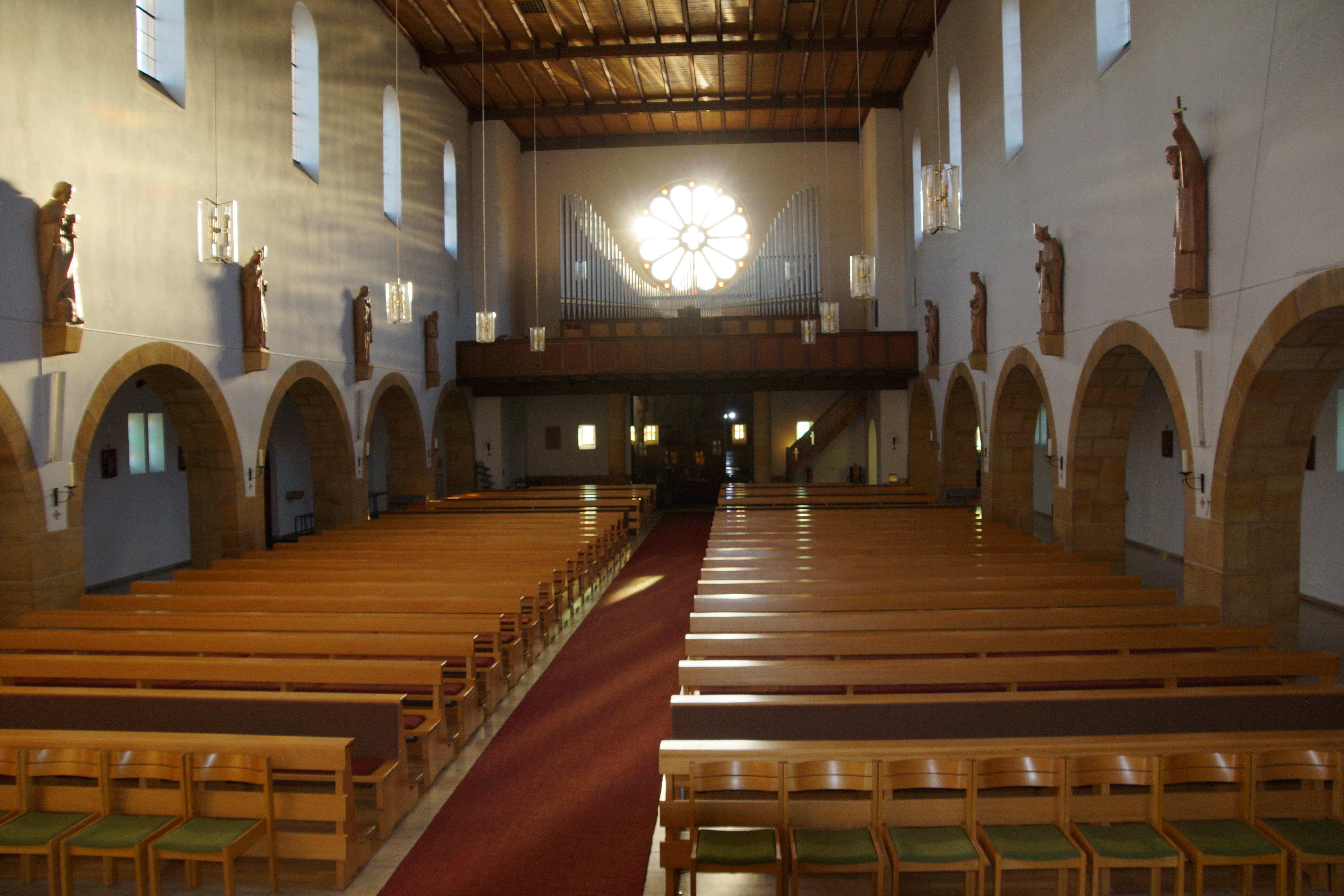 Die Pfarrkirche St. Barbara in Bodenwöhr